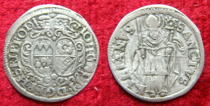 Schilling aus dem Bistum Würzburg von 1692, zeigt rückseitig Wappen des Bischofs Johann Gottfried von Guttenberg